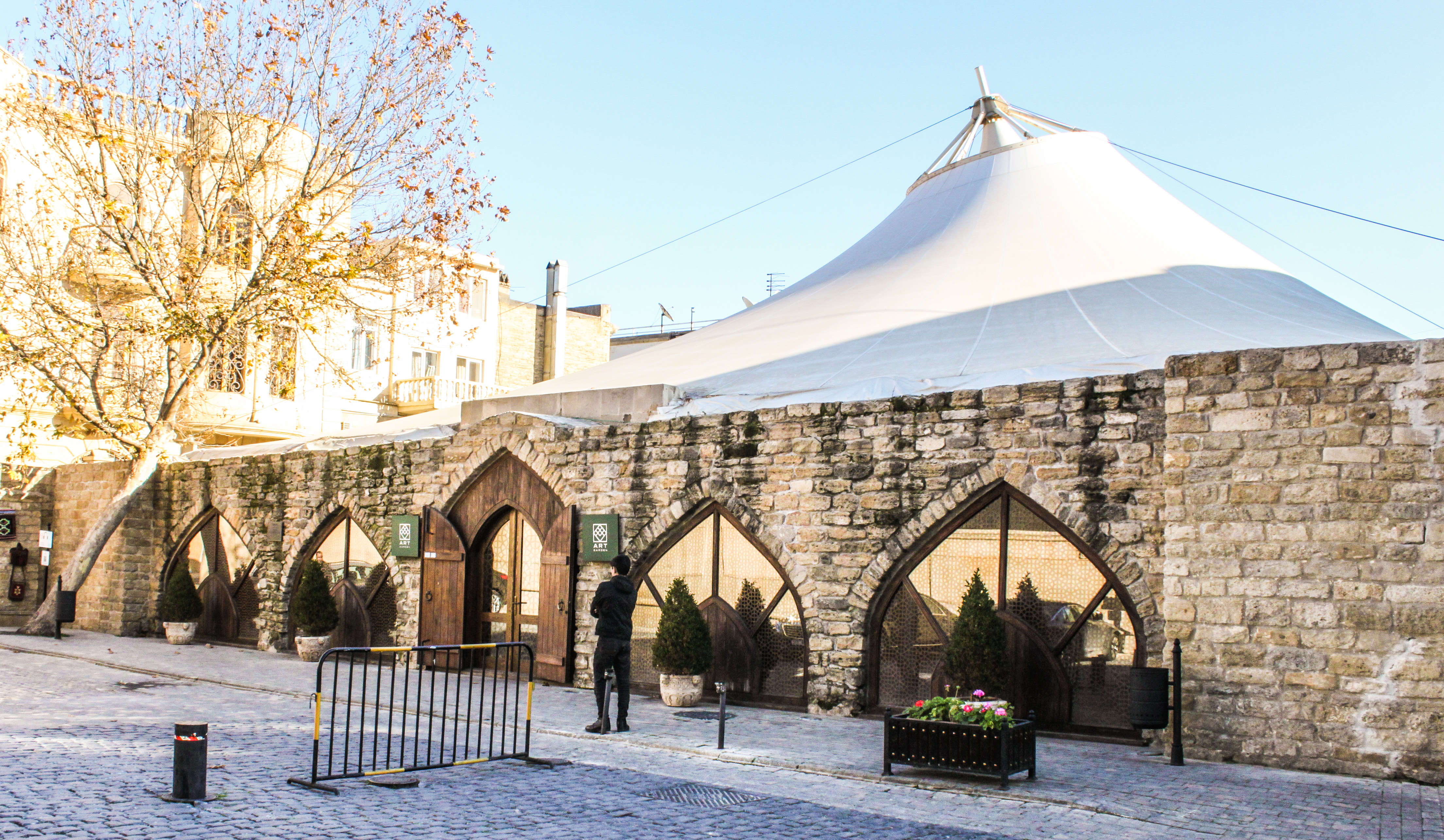 Kiçik karvansaray və hücrələr